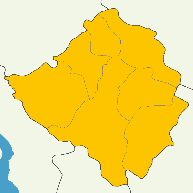 Kırşehir'de 2014 Türkiye cumhurbaşkanlığı seçimi sonuçları